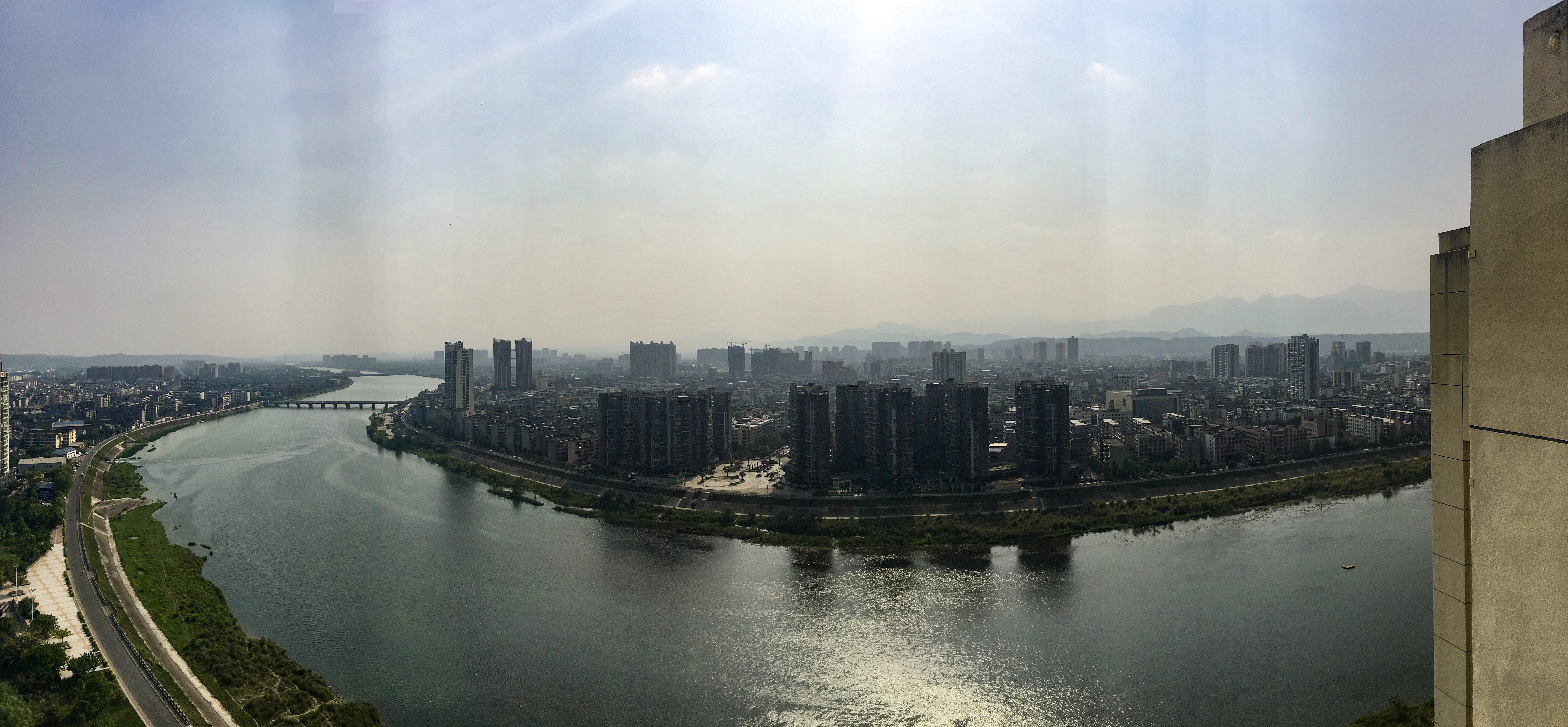 从麓涪宫28层天台拍摄，使用iPhone appSE，经Lr调整去雾